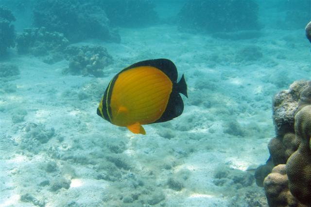 Chaetodon melapterus en isla Kish, Irán.